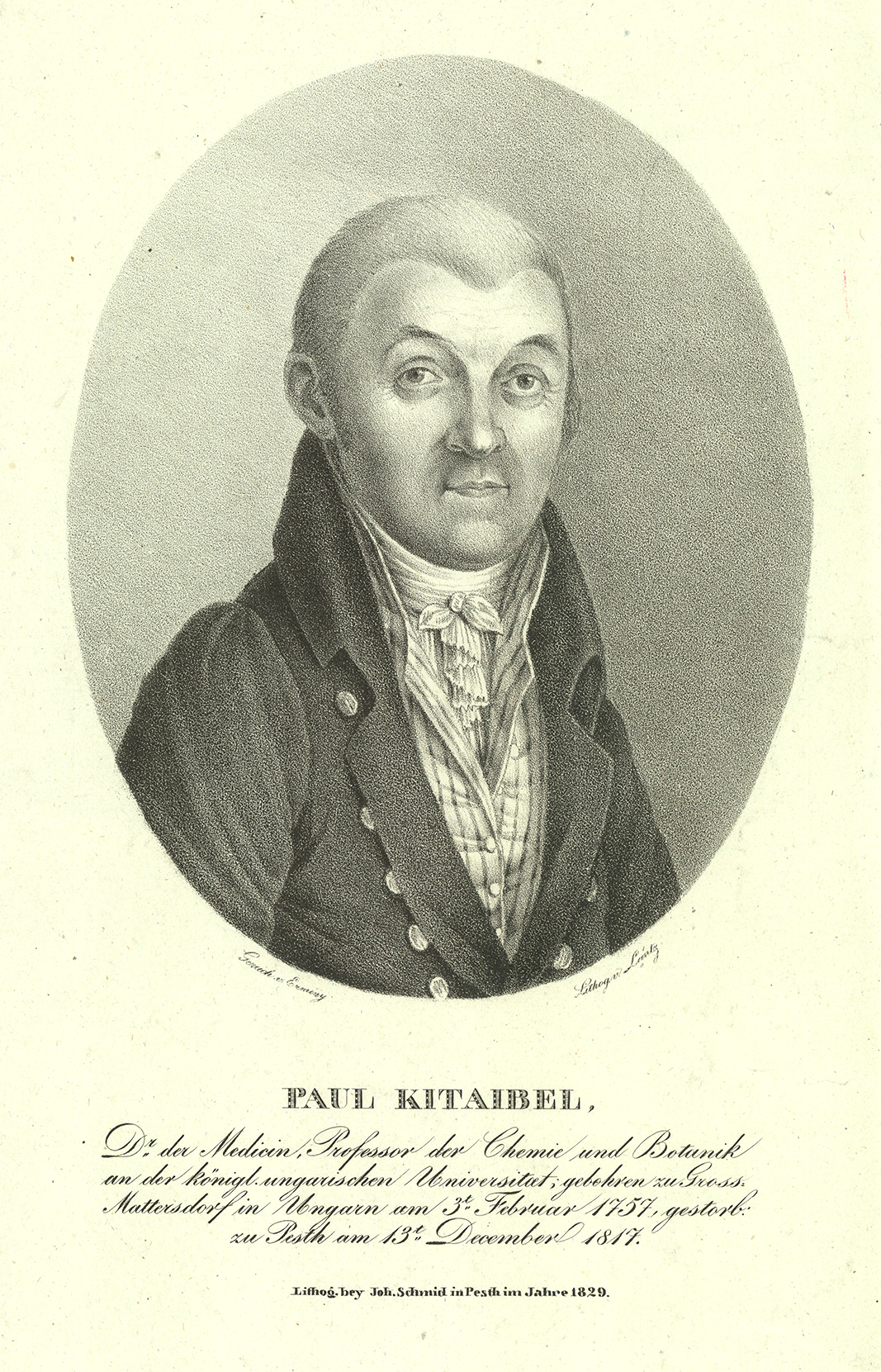 Kitaibel Pál (Nagymarton, 1757. február 3. – Pest, 1817. december 13.[1]) magyar botanikus és kémikus. Összegyűjtötte és leírta Magyarország növényeit, kőzeteit és ásványvizeit. Kora természettudományainak szinte minden ágában dolgozott. Botanikai szakmunkákban nevének rövidítése: „Kit.”.